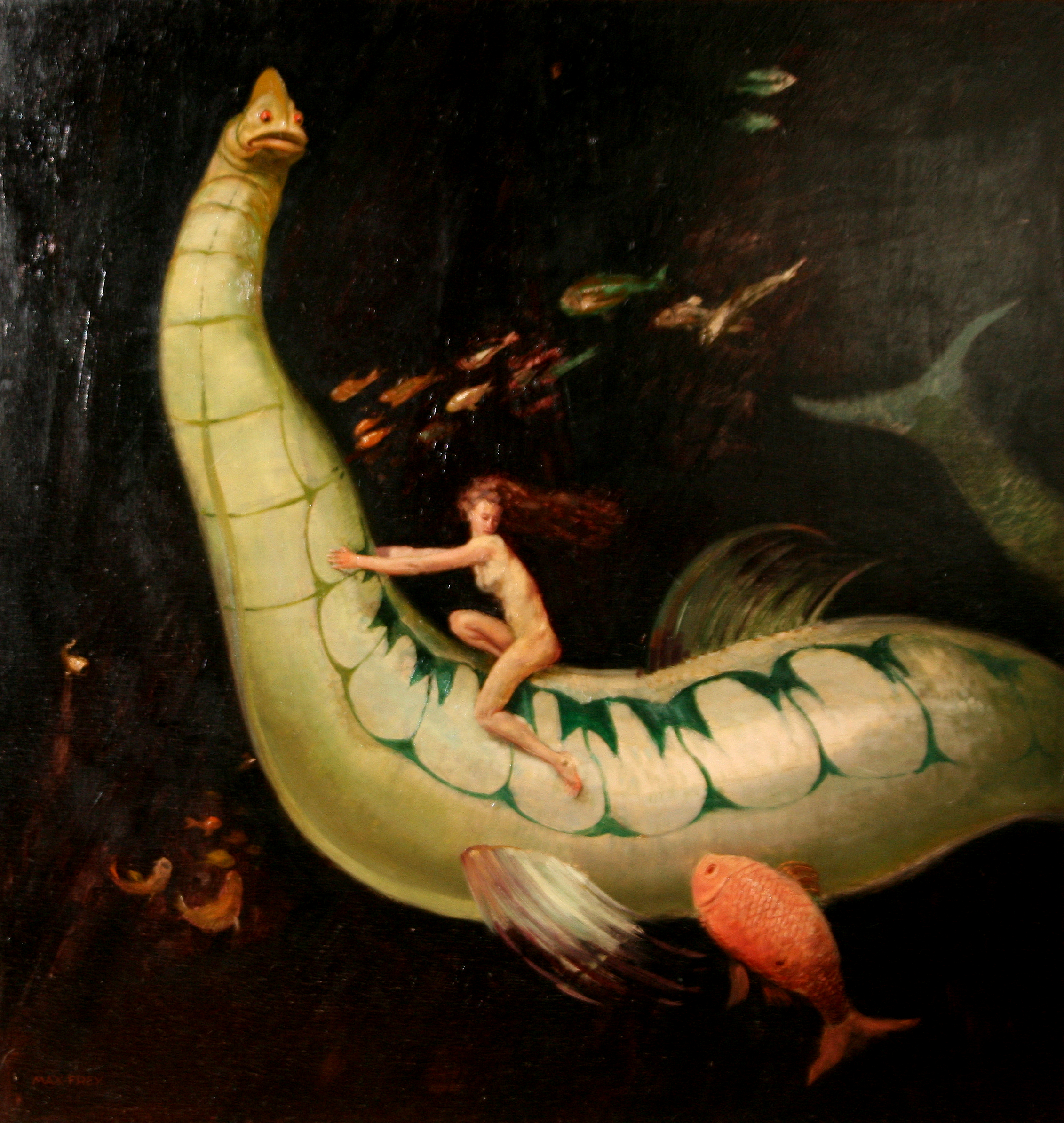 Max Frey (1874-1944): Meerestiefe, ca. 1926. Öl auf Hartfaser. 70 x 70cm